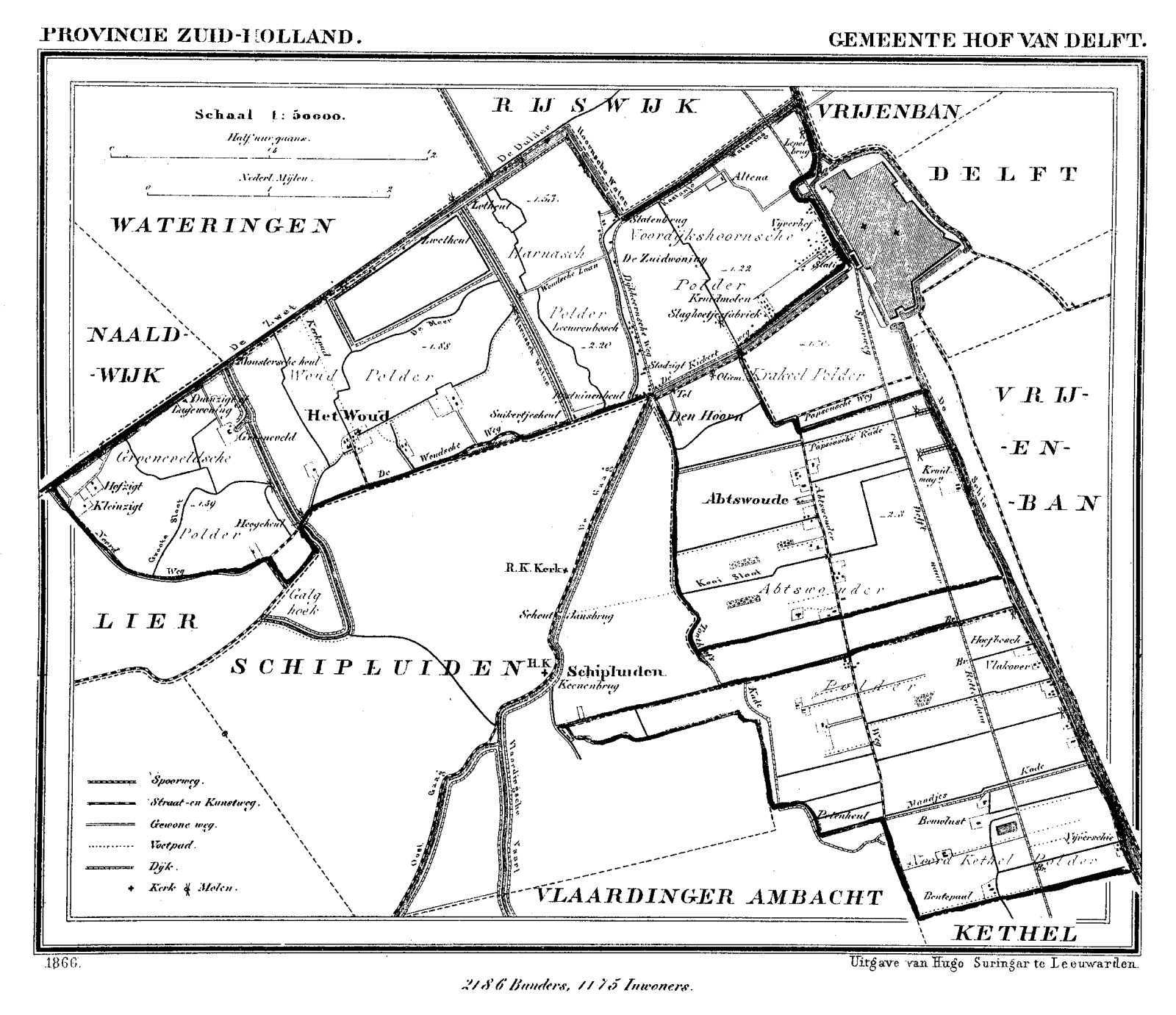 bron